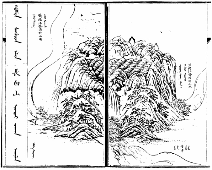 長白山（原書插圖）